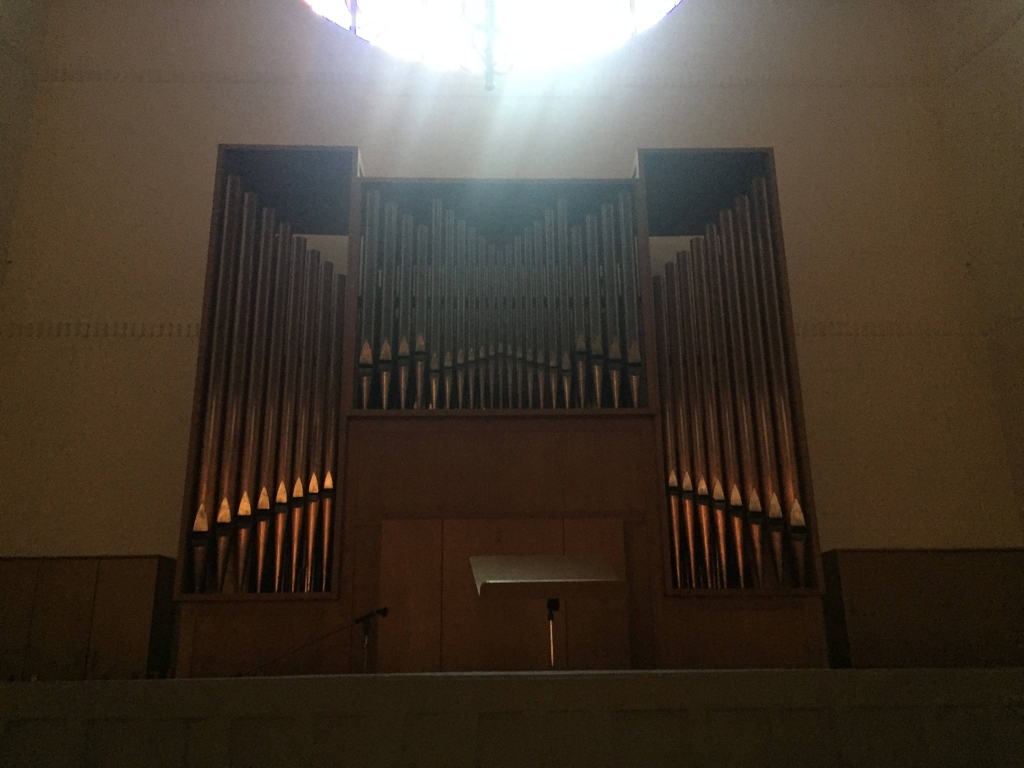 Heilig-Geist-Kirche (Windischeschenbach-Neuhaus), Orgel mit Empore